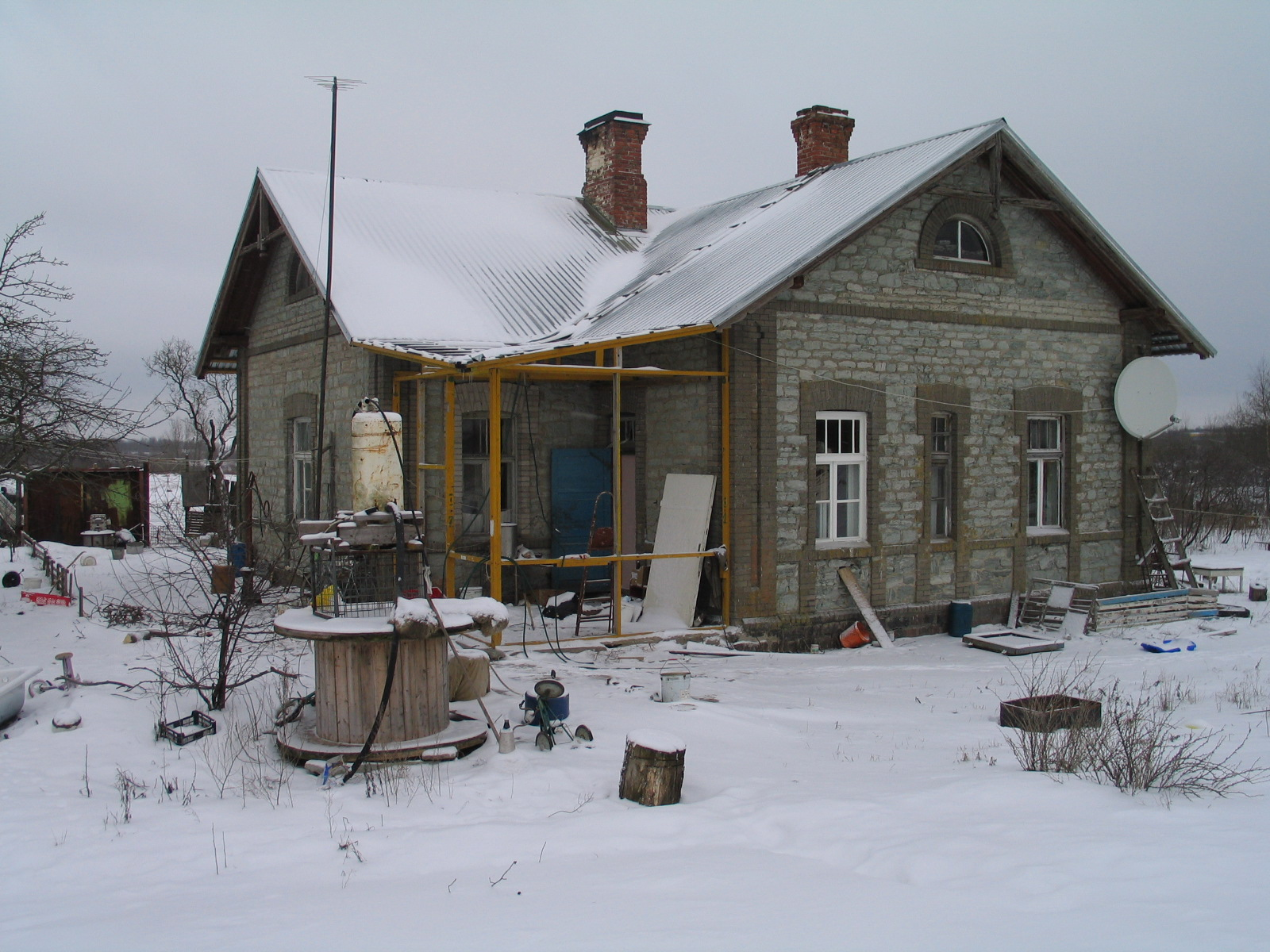 Harku jaamahoone, Hüüru küla